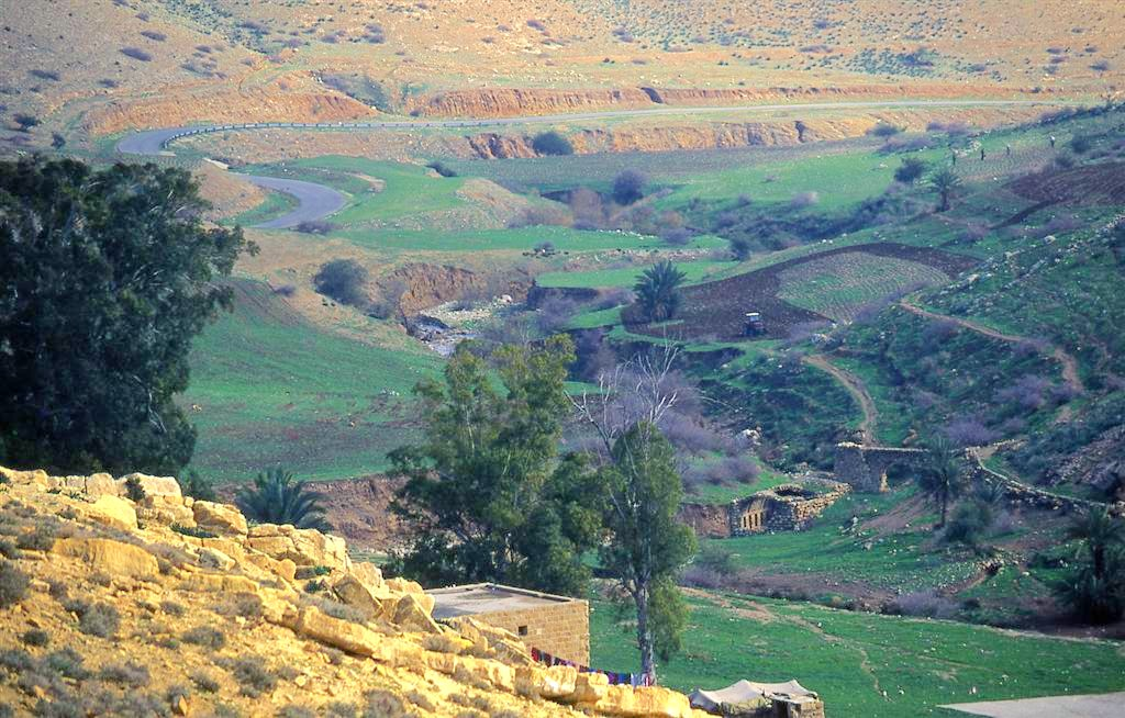 חמאם אל-מליח